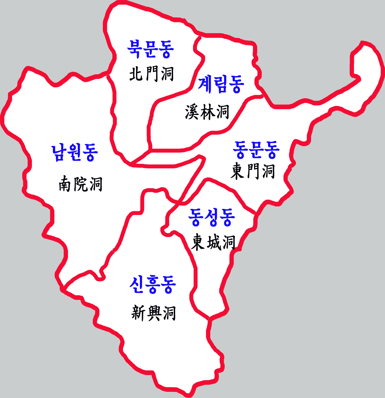 상주시 시내구역도